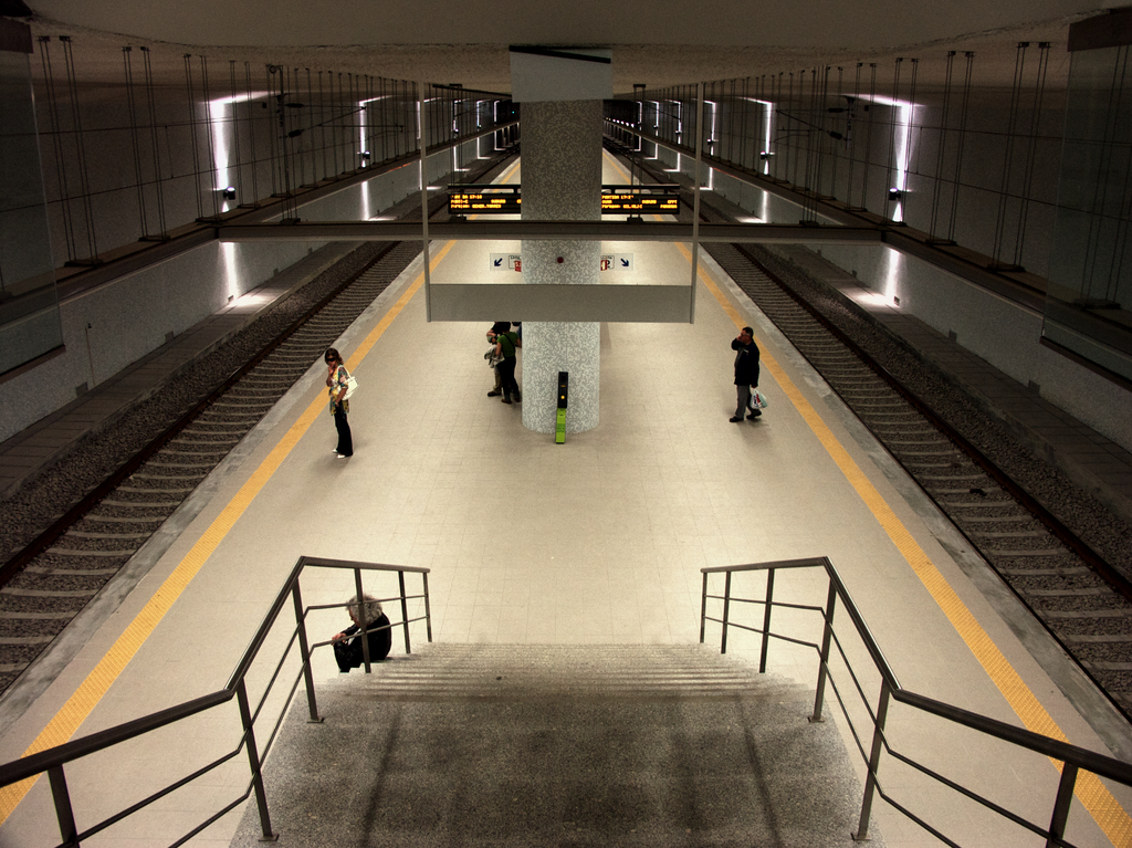 Tipo: EP (Apeadeiro) Local: Espinho Linha do Norte, PK 316 Data e hora: 16 de Junho de 2008 17h16